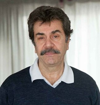 نقاش و نگاره گر ایرانی اهل یاسوکند